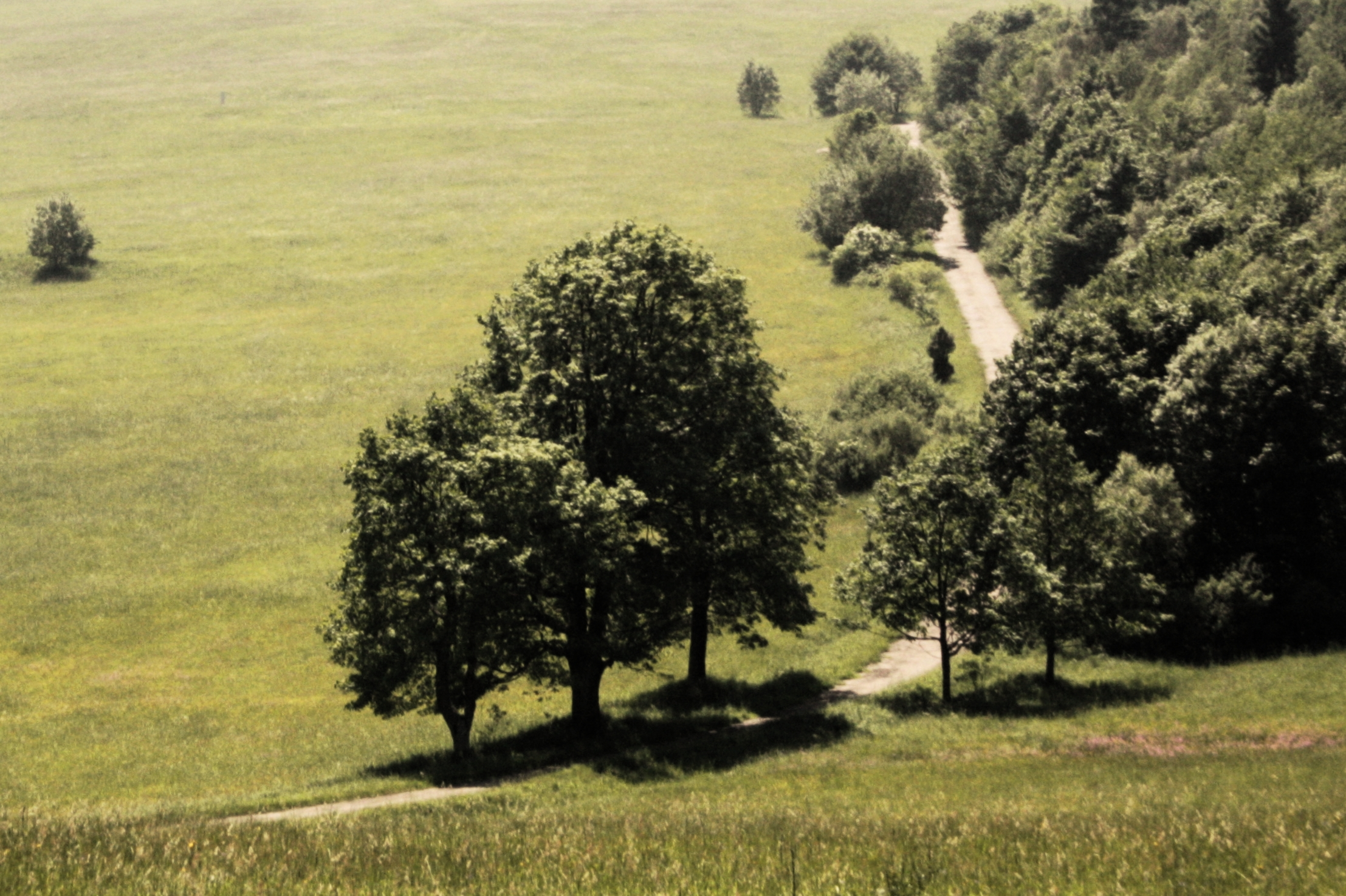 Specjalny obszar ochrony siedlisk Ostoja Magurska. This is a photography of Natura 2000 protected area with ID PLH180001